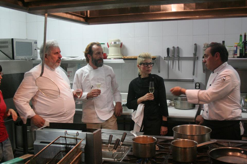 Fotografía durante la grabación del capítulo 13 de la serie de televisión mexicana En Materia de Pescado. se trata de la cocina del Chef Humberto Fregoni. En la imagen aparecen Daniel Giménez Cacho, Marco Rascón, Ely Guerra y Humberto Fregoni